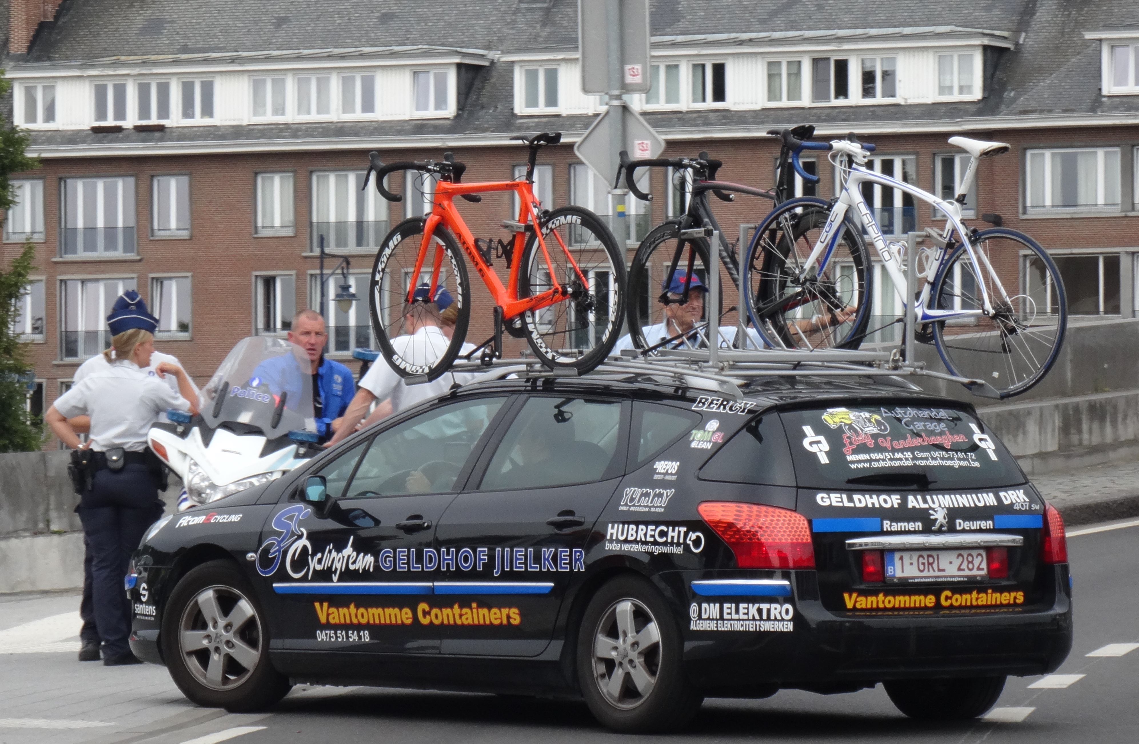 Reportage photographique réalisé le mercredi 6 août à l'occasion du départ de la première étape du Tour de la province de Namur 2014 à Jambes (Namur), Belgique.